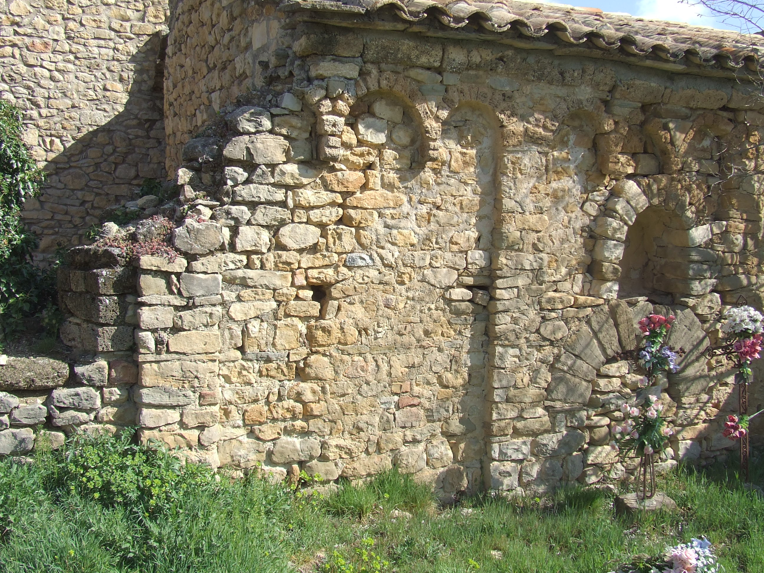 Detall de la façana meridional de Santa Maria de la Clua (Sant Esteve de la Sarga, Pallars Jussà)